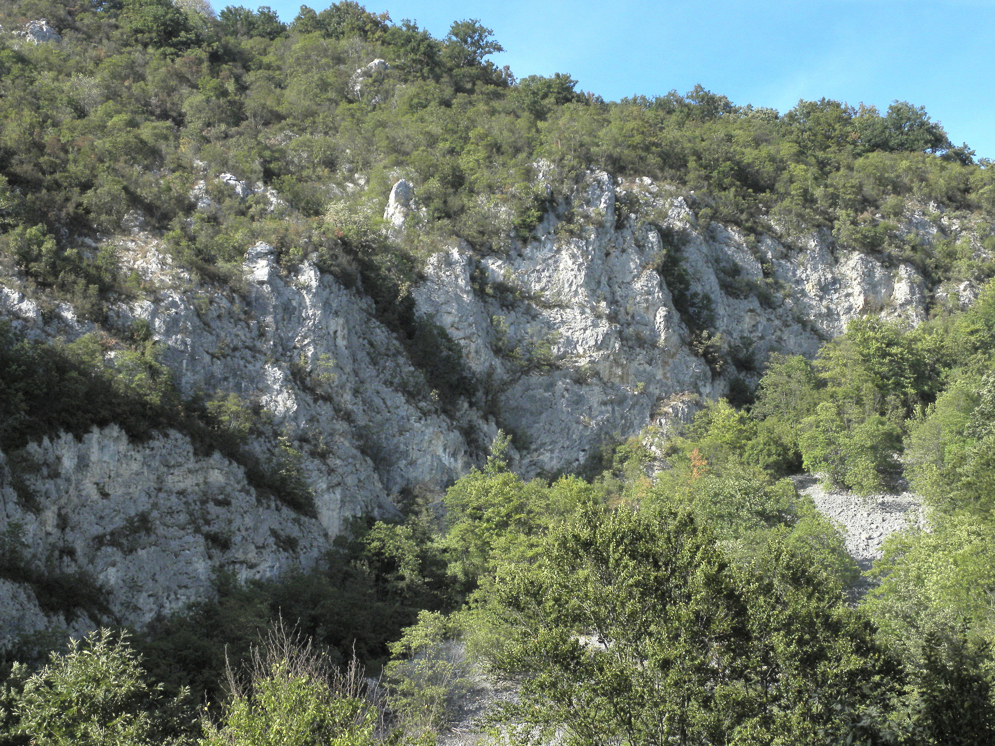 Banat,Nera Canyon